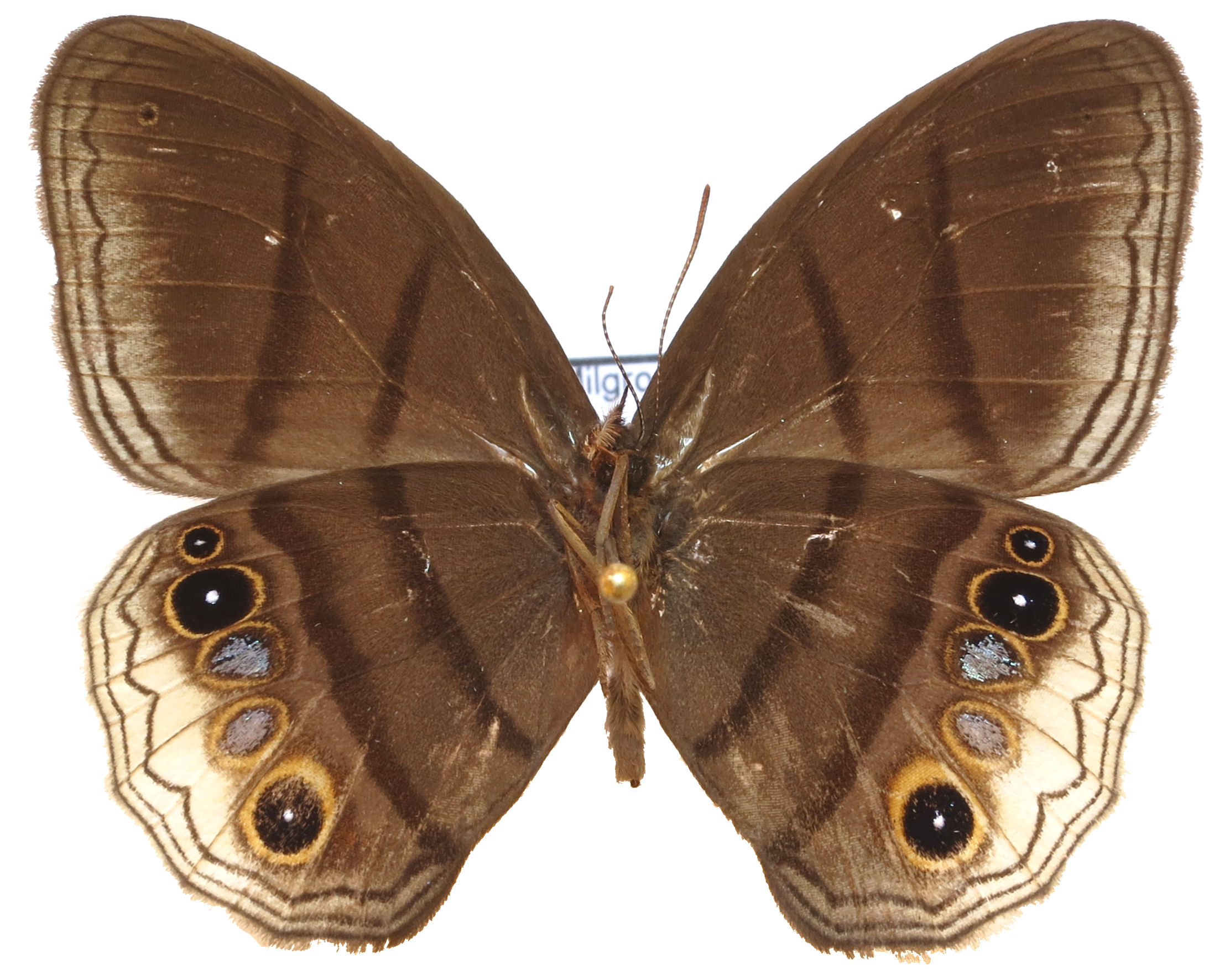 Magneuptychia pax El Milagro, Loreto, Peru Diciembre 2016